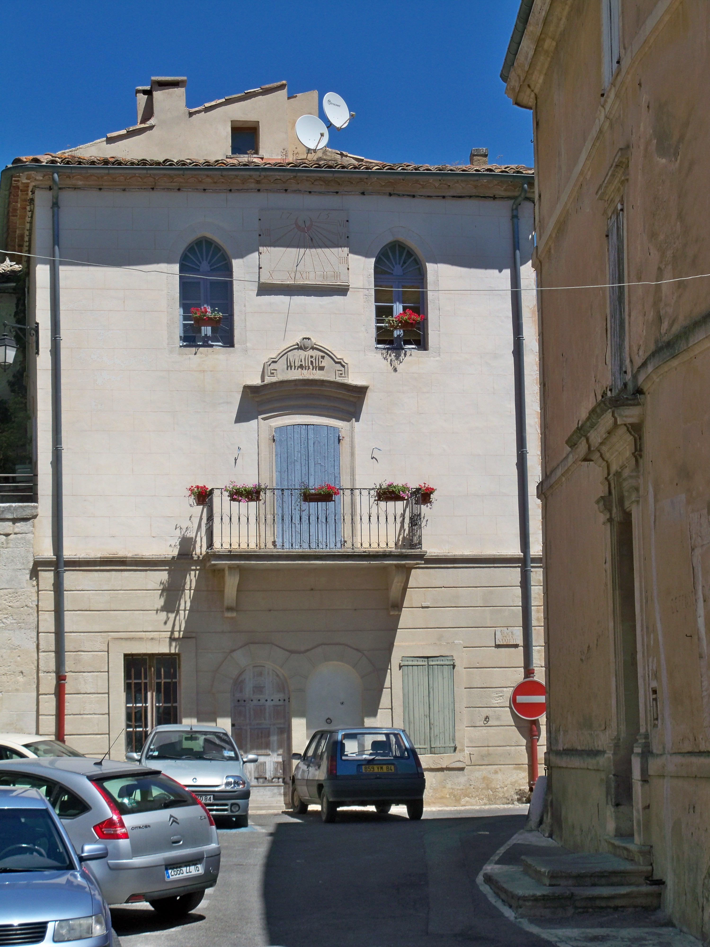 Mairie de Lacoste, Vaucluse, France